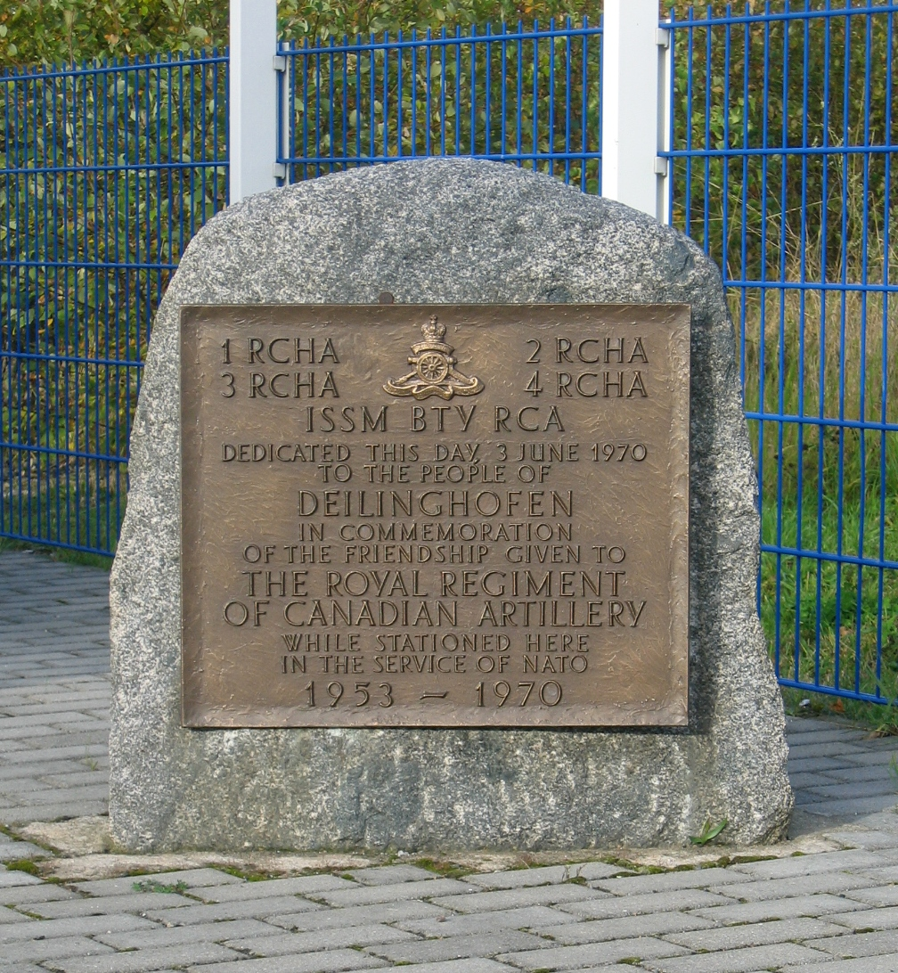 ECD-Erinnerungsstätte in Hemer-Deilinghofen. Gedenkstein "The Royal Regiment of Canadian Artillery" (Deilinghofen 1953 bis 1970).